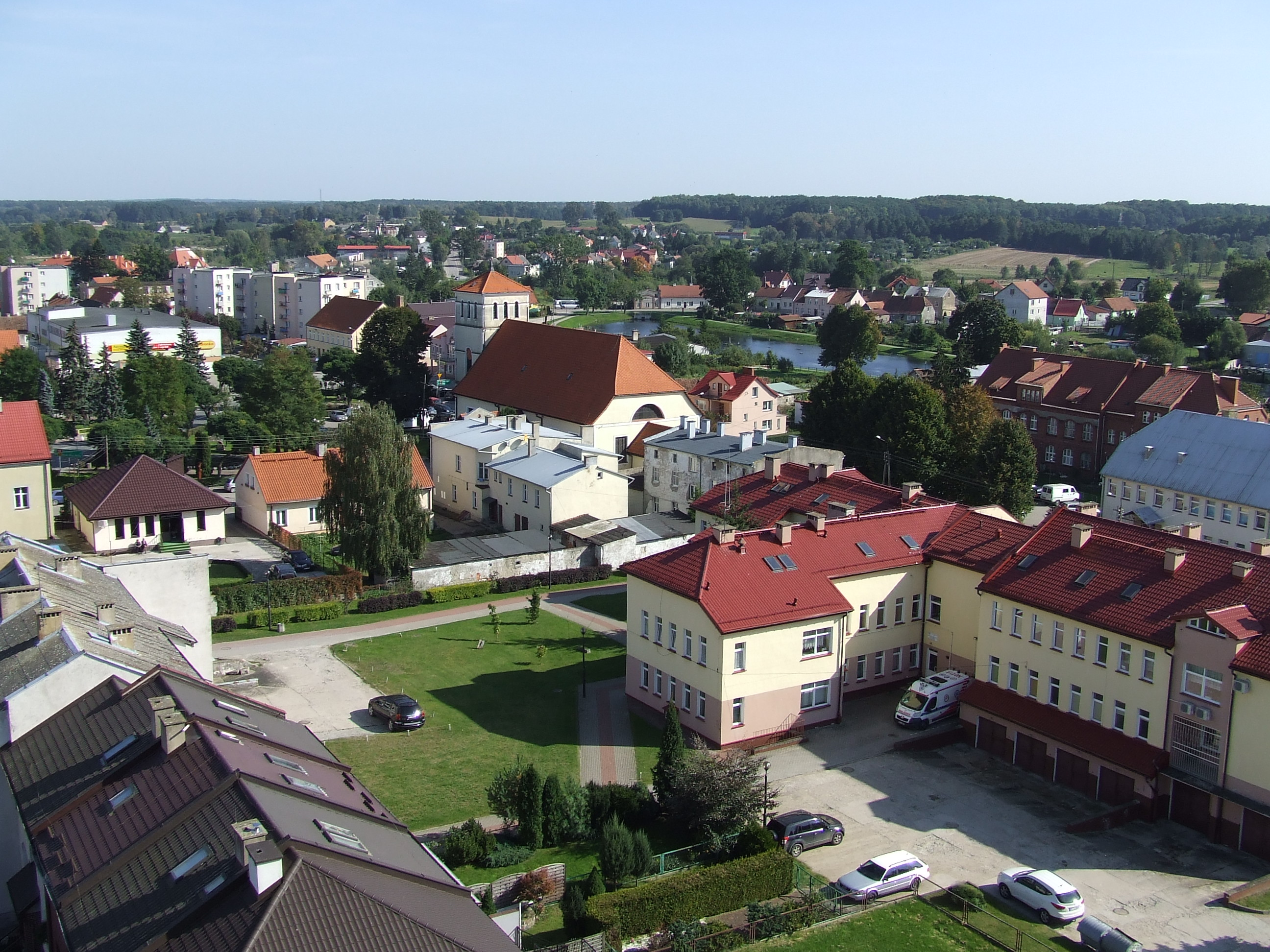 Biała Piska - widok z wieży ciśnień